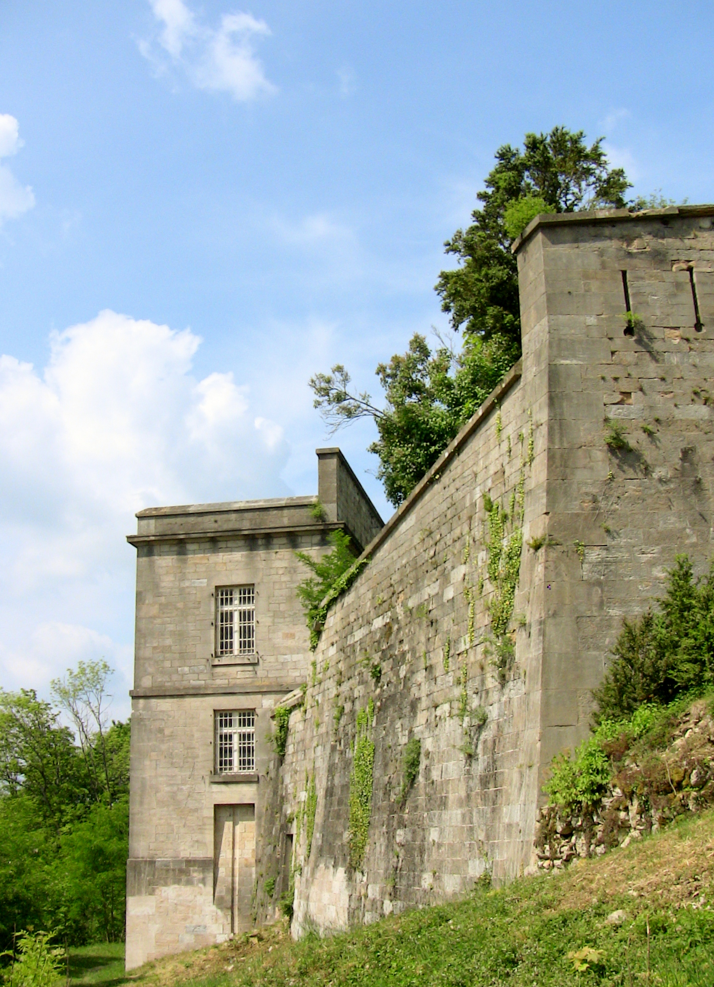 Le front arrière du fort de Beauregard, à Besançon (Doubs, France).